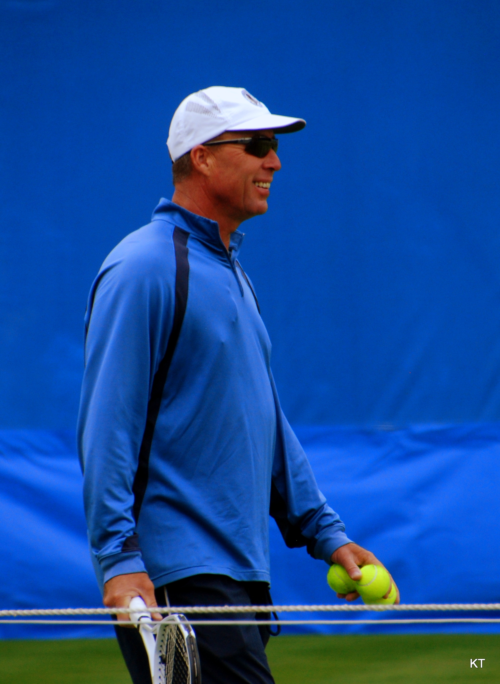 At Queens Club